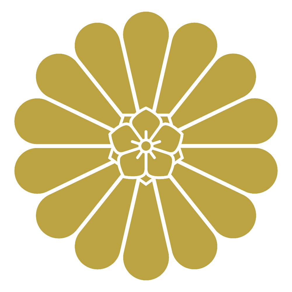 梨本宮家紋章